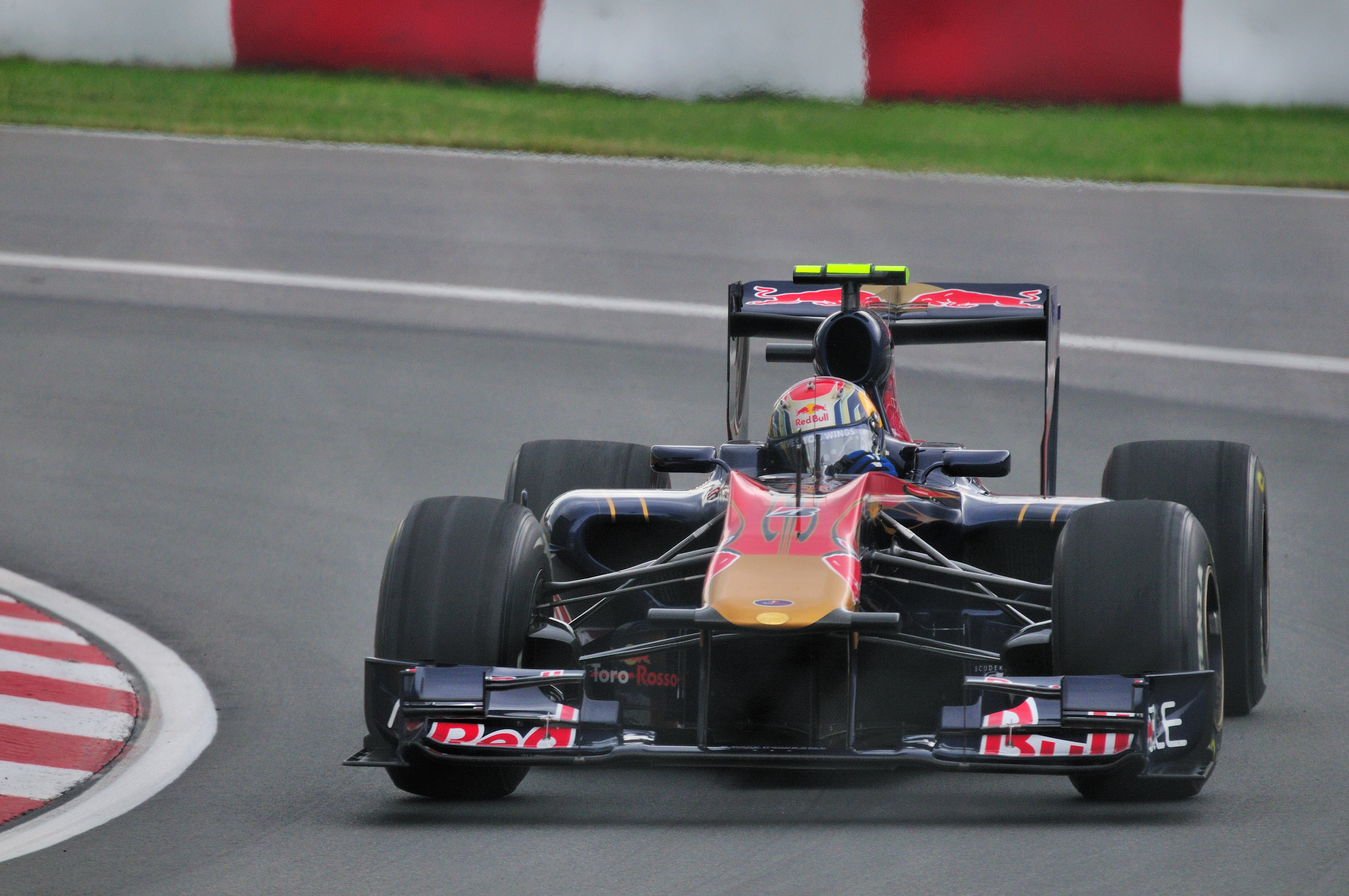 Toro Rosso driver Jaime Alguersuari (2010 Montreal GP)